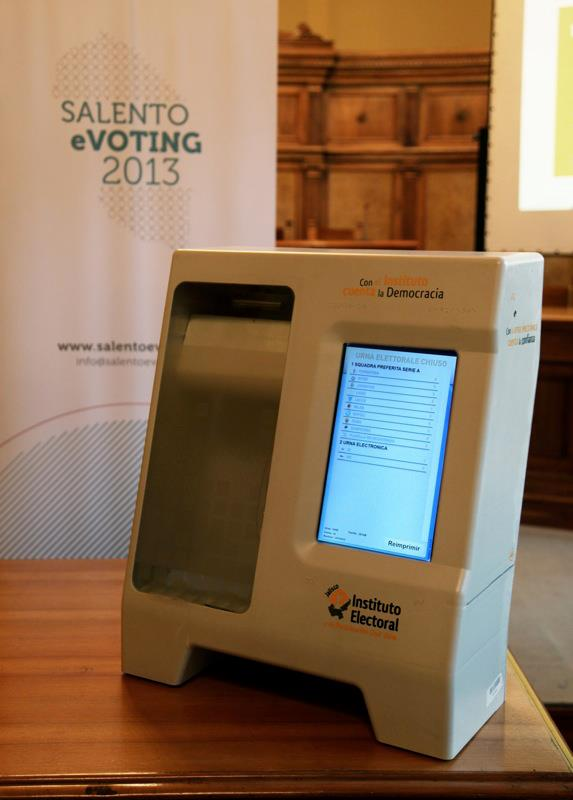 L'Urna elettronica messicana è stata utilizzata nelle ultime elezioni nello stato di Jalisco. Sarà utilizzato per il progetto Salento eVoting